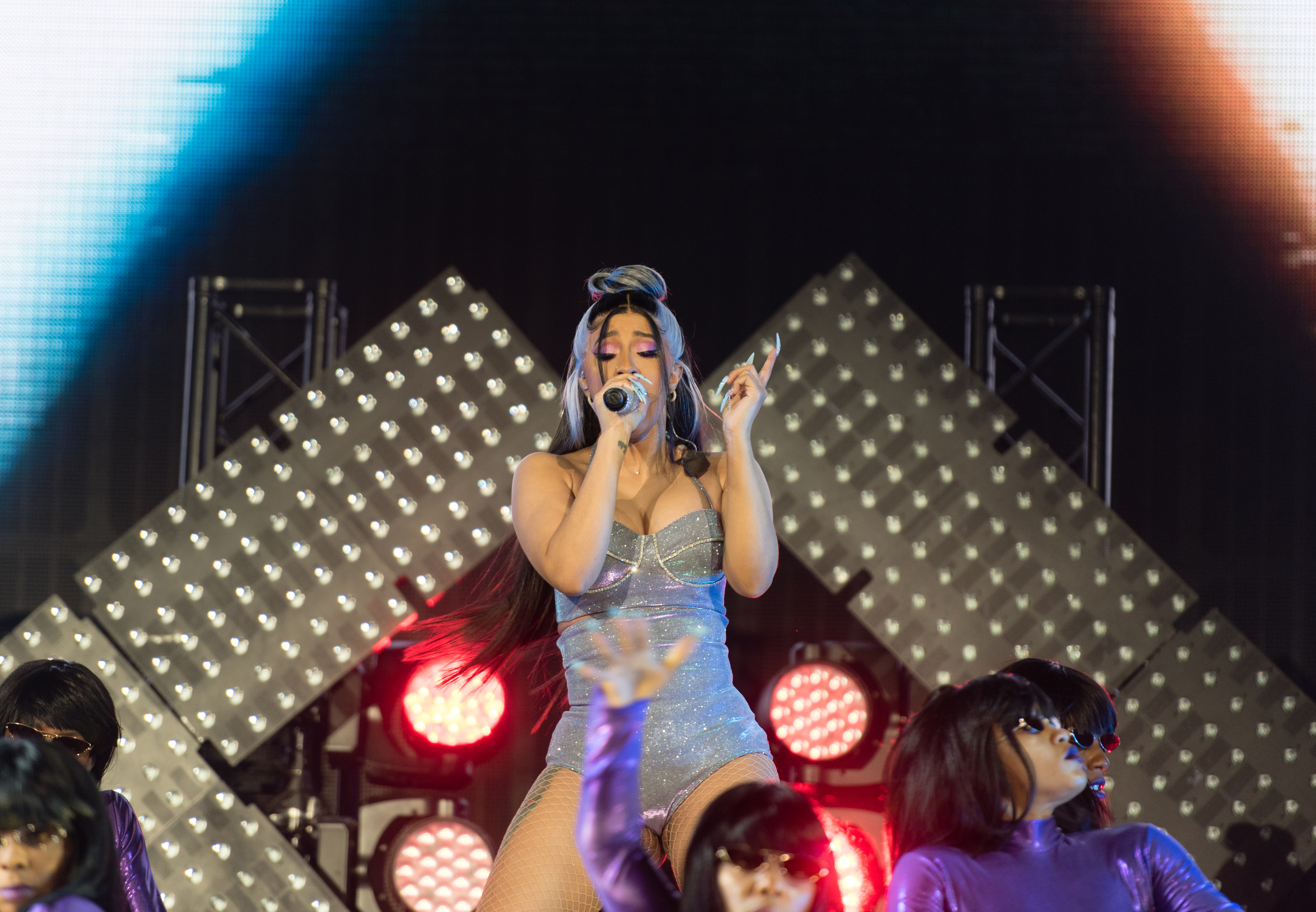 Cardi B live auf dem Openair Frauenfeld 2019